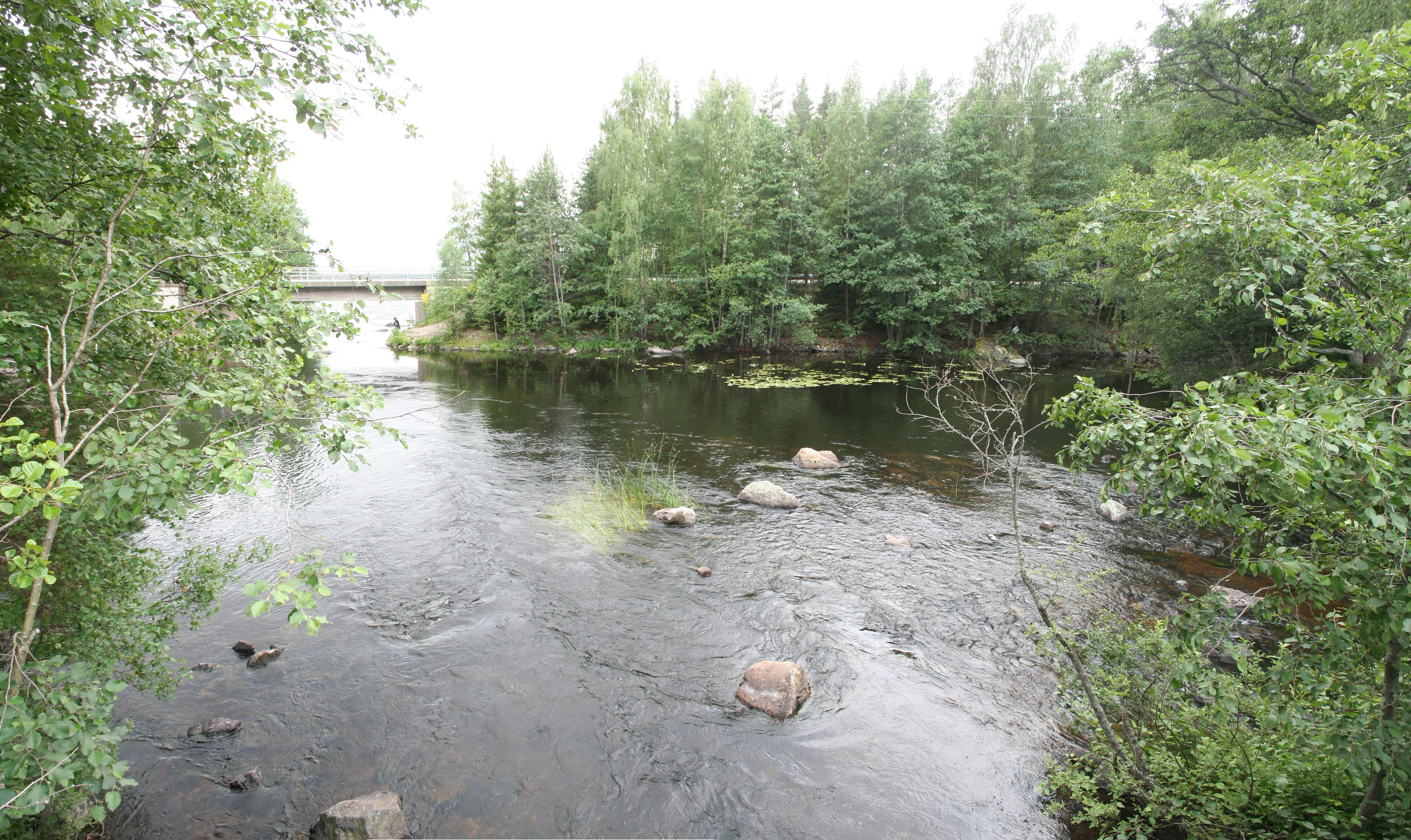 Viheriänkoski, Joutsa, Finland, kalliomaalaus, petroglyph, painting